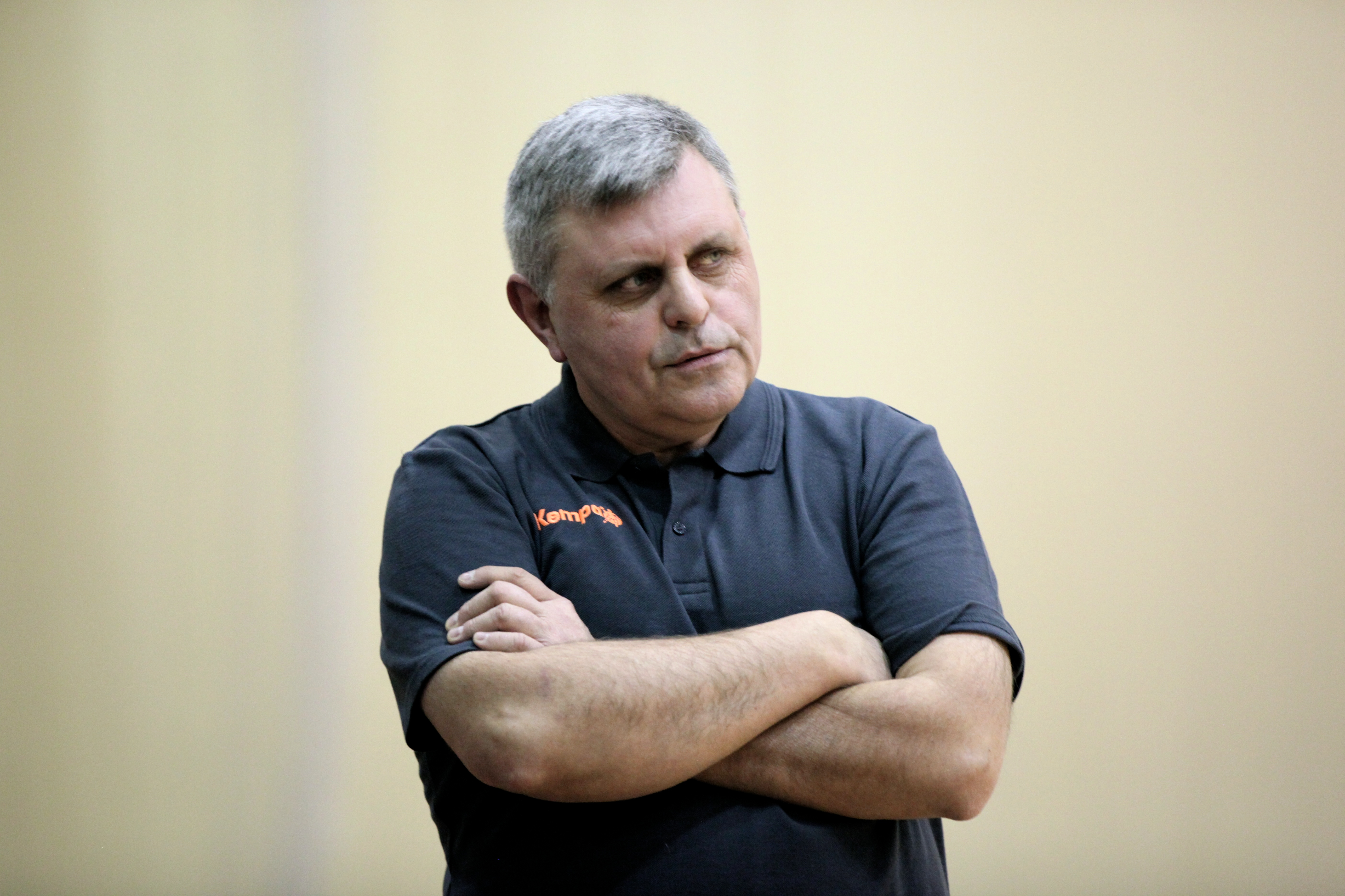 sezon 2014/2015